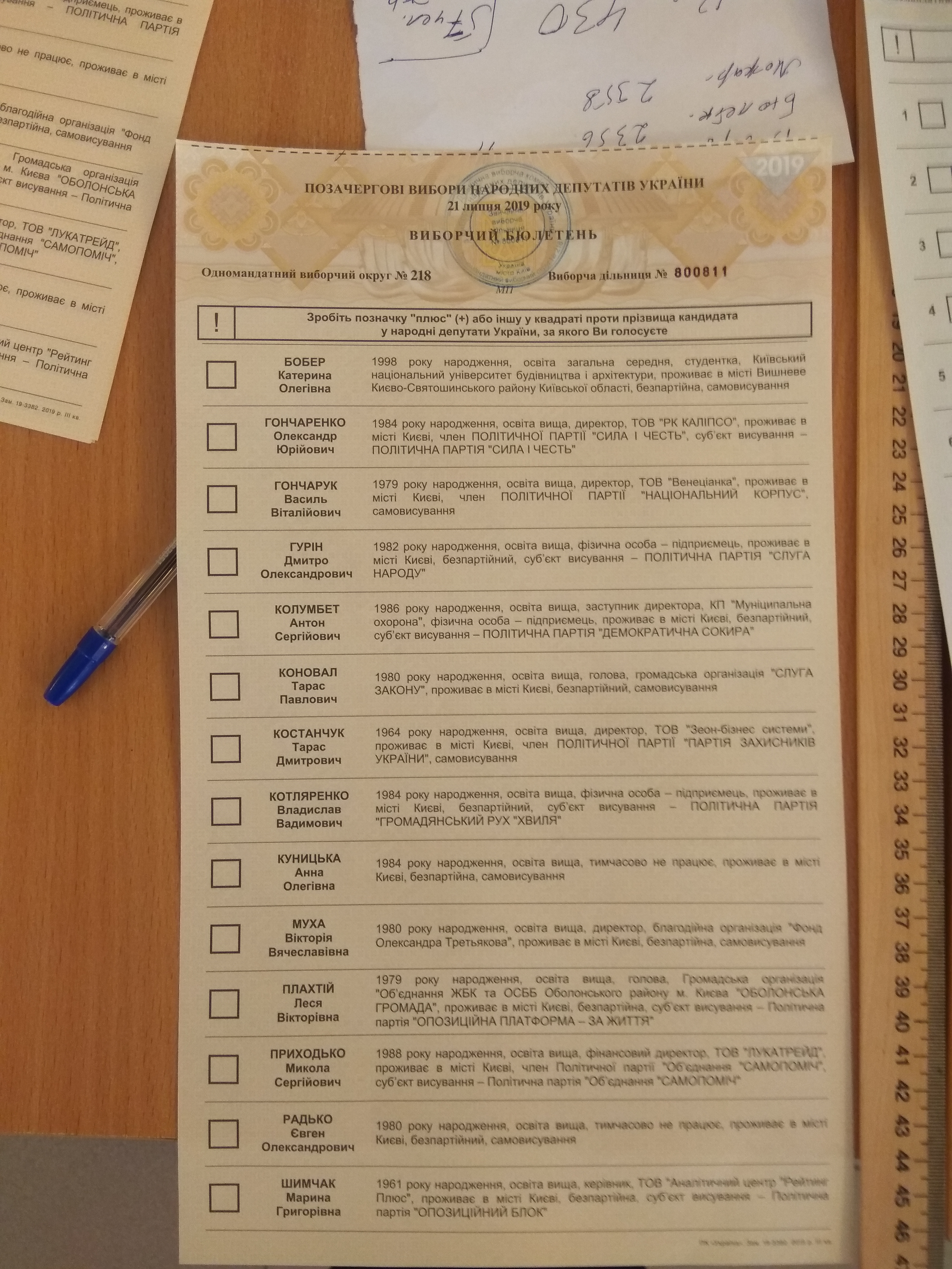 Позачергові парламентські вибори в Україні 2019. Виборчий бюлетень (мажоритарний список, округ 218)